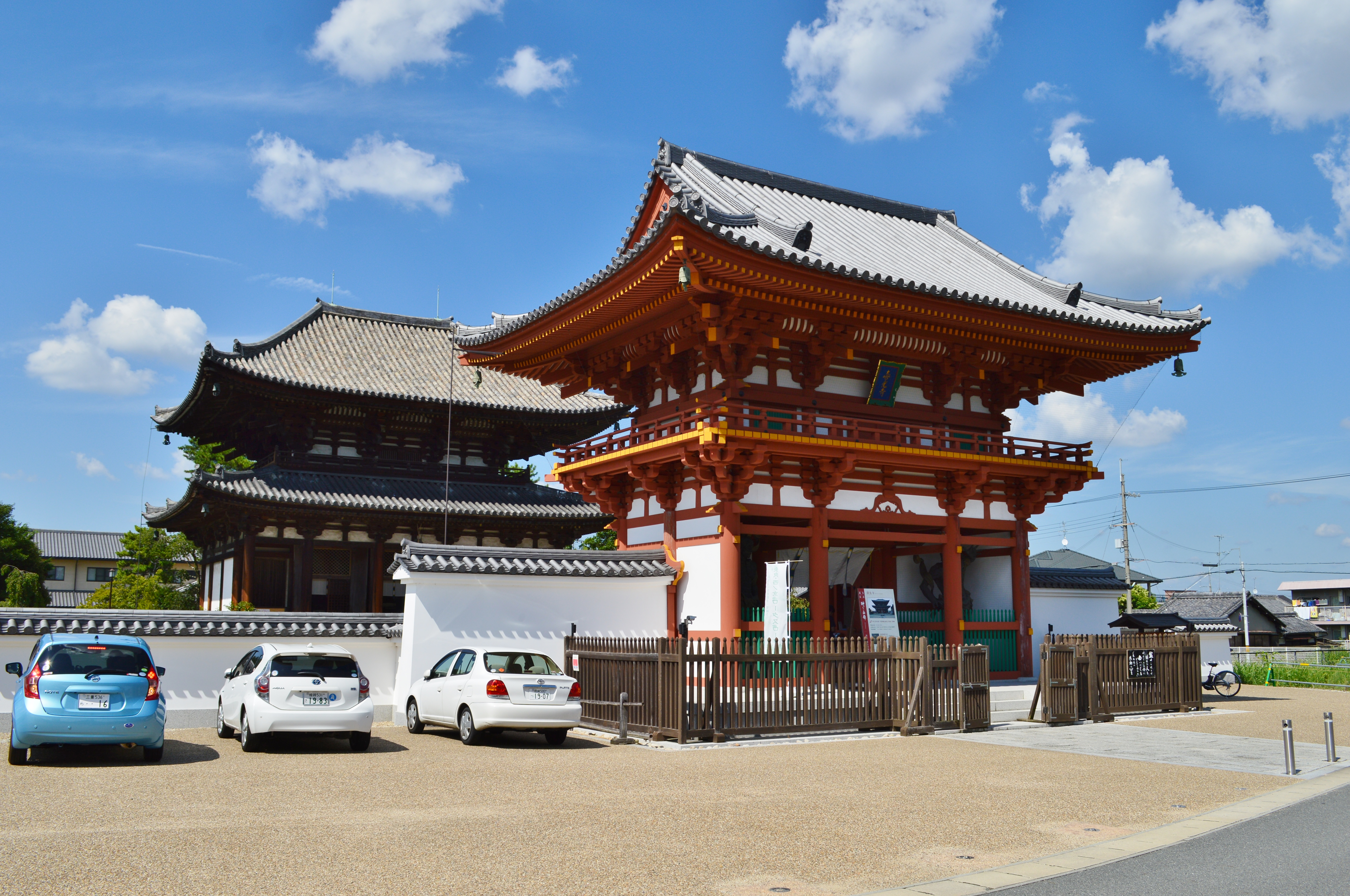 喜光寺 (奈良市) 境内全景